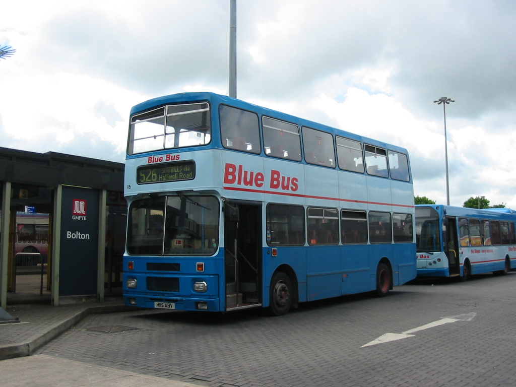 Blue Bus 115 H115ABV